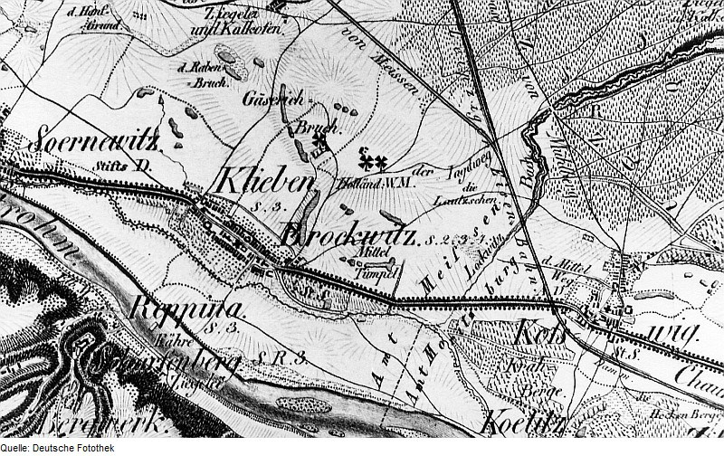 Original image description from the Deutsche Fotothek Coswig-Brockwitz. Oberreit, Sect. Dresden, 1821/22